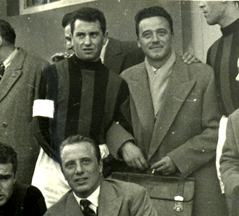 Andrea Bonomi and Ferdinando Valletti